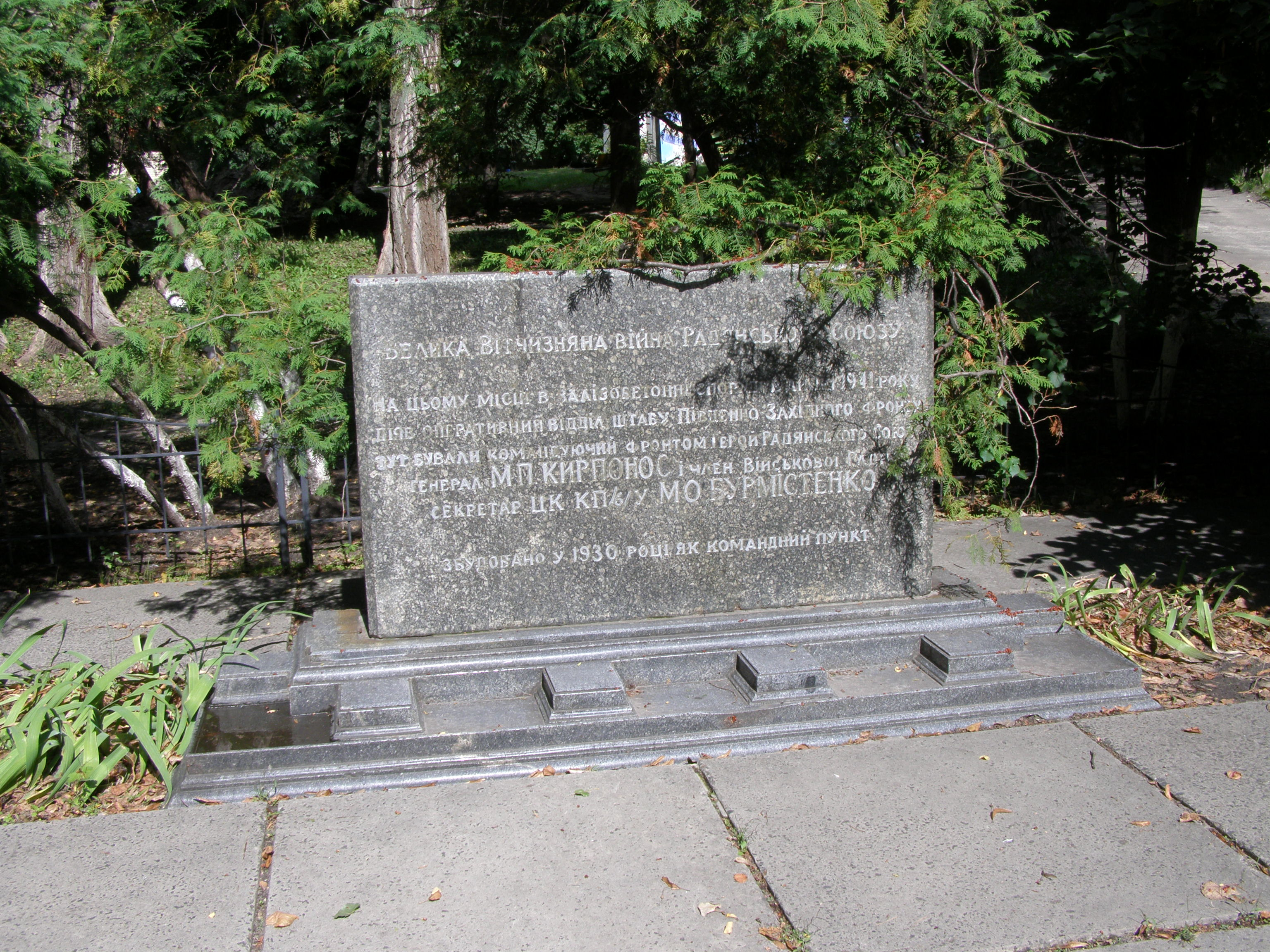 Пам’ятний знак, встановлений за адресою вул. Верховинна, 80, де в липні 1941 року в залізобетонному бункері діяв оперативний штаб Південно-Західного фронту